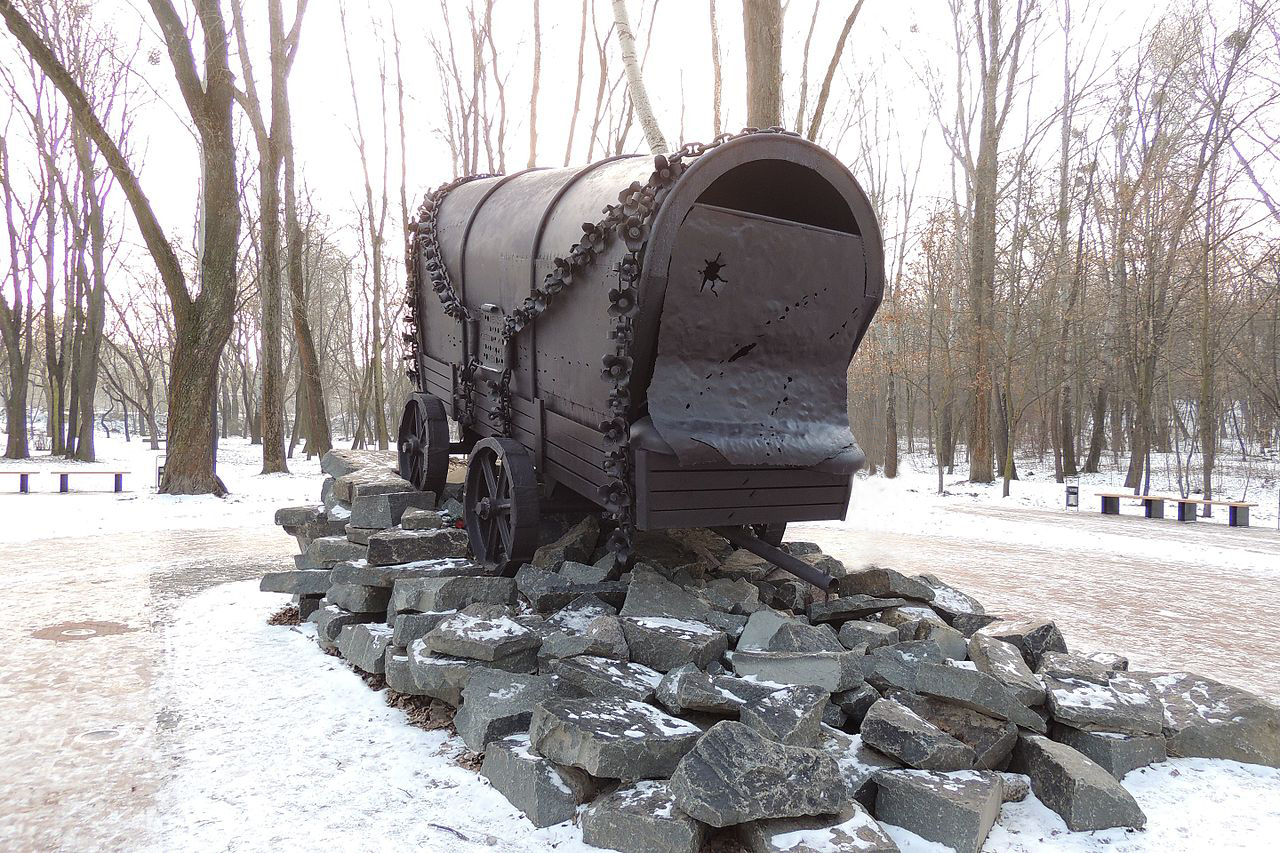 Chariot de fer transpercé de balles